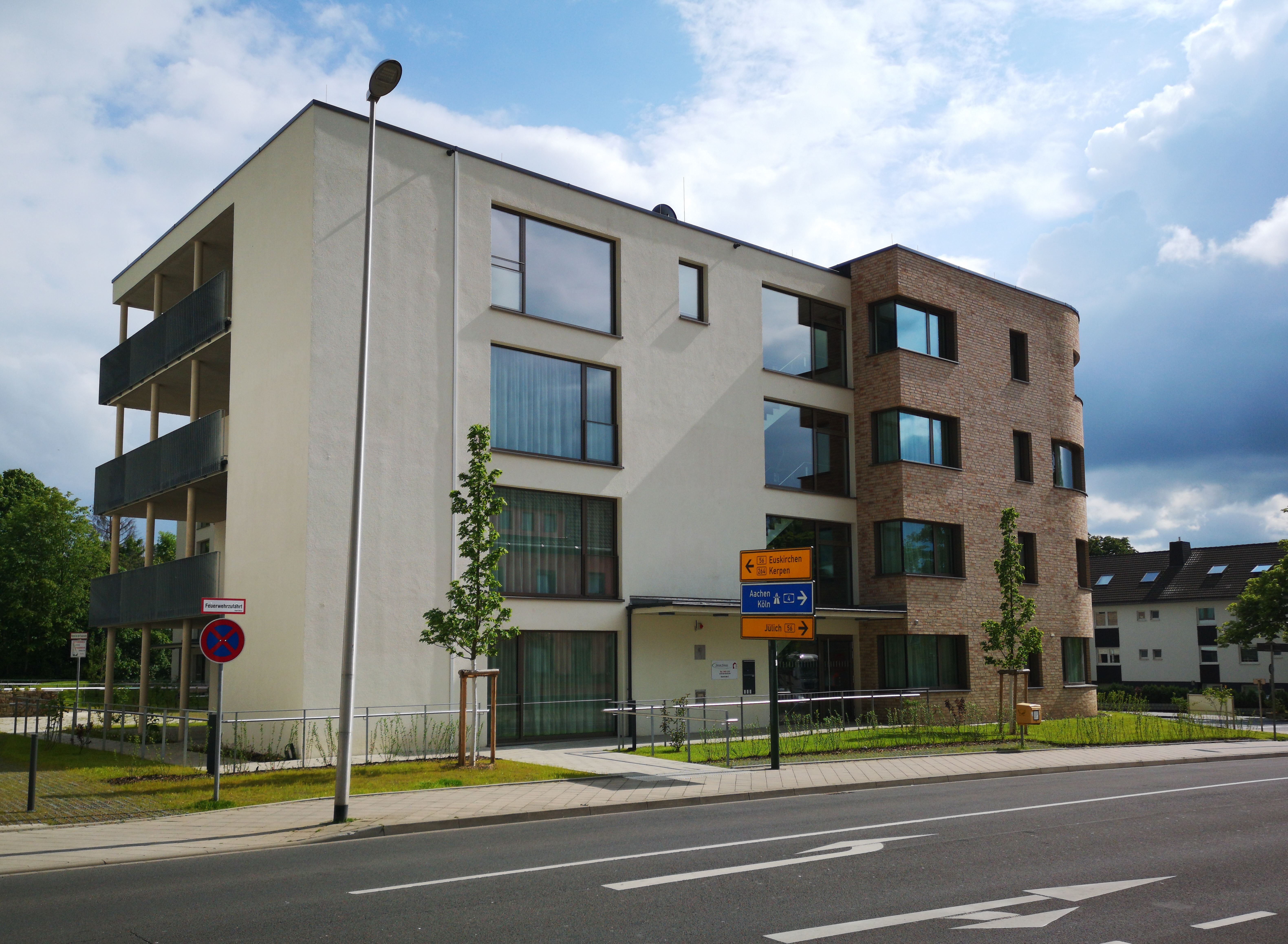 Neubau des Rheinischen Blindenheims in Düren